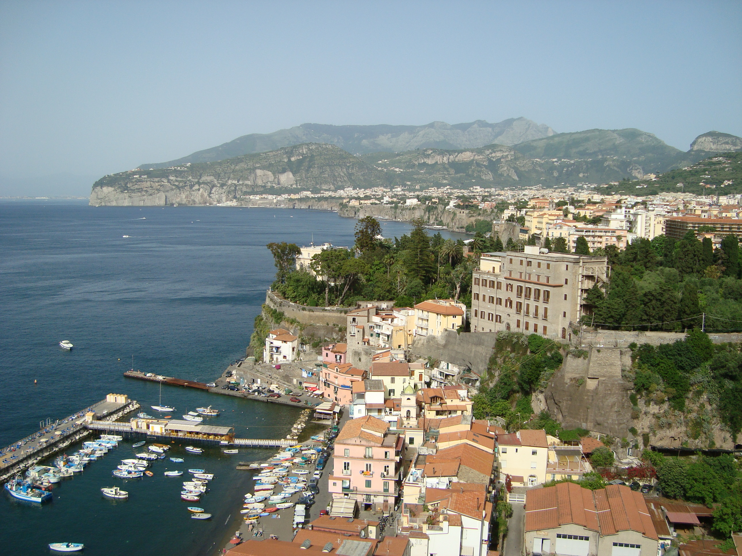 Sorrento